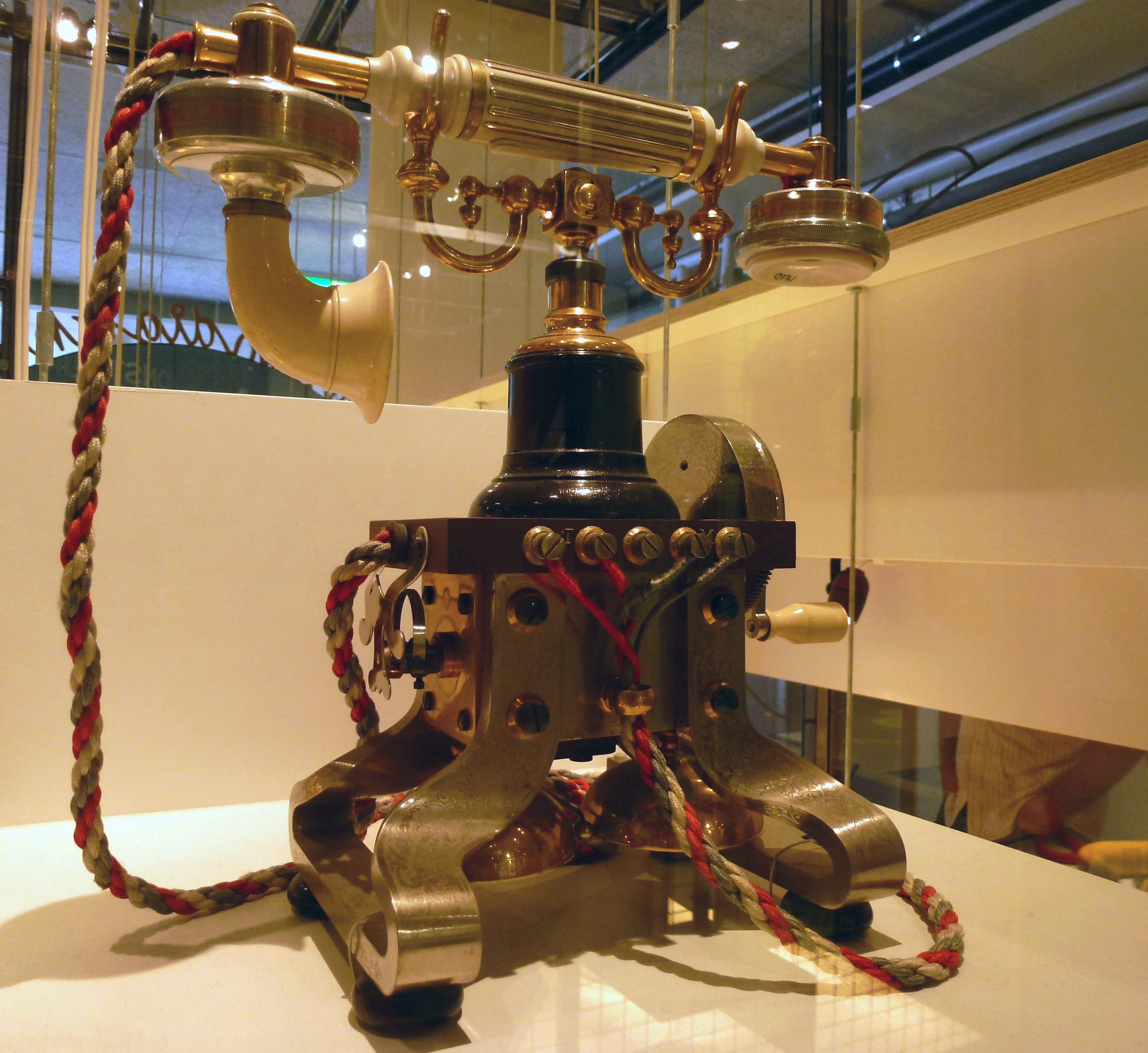 För den ryska tsaren Nikolaj II och hans familj tillverkade Ericsson en specialutgåva (upplaga 10 st.) i början av 1900-talet. Modellen hade detaljer i guld och elfenben och sladden var flätat i de ryska färgerna, vitt, blått och rött.